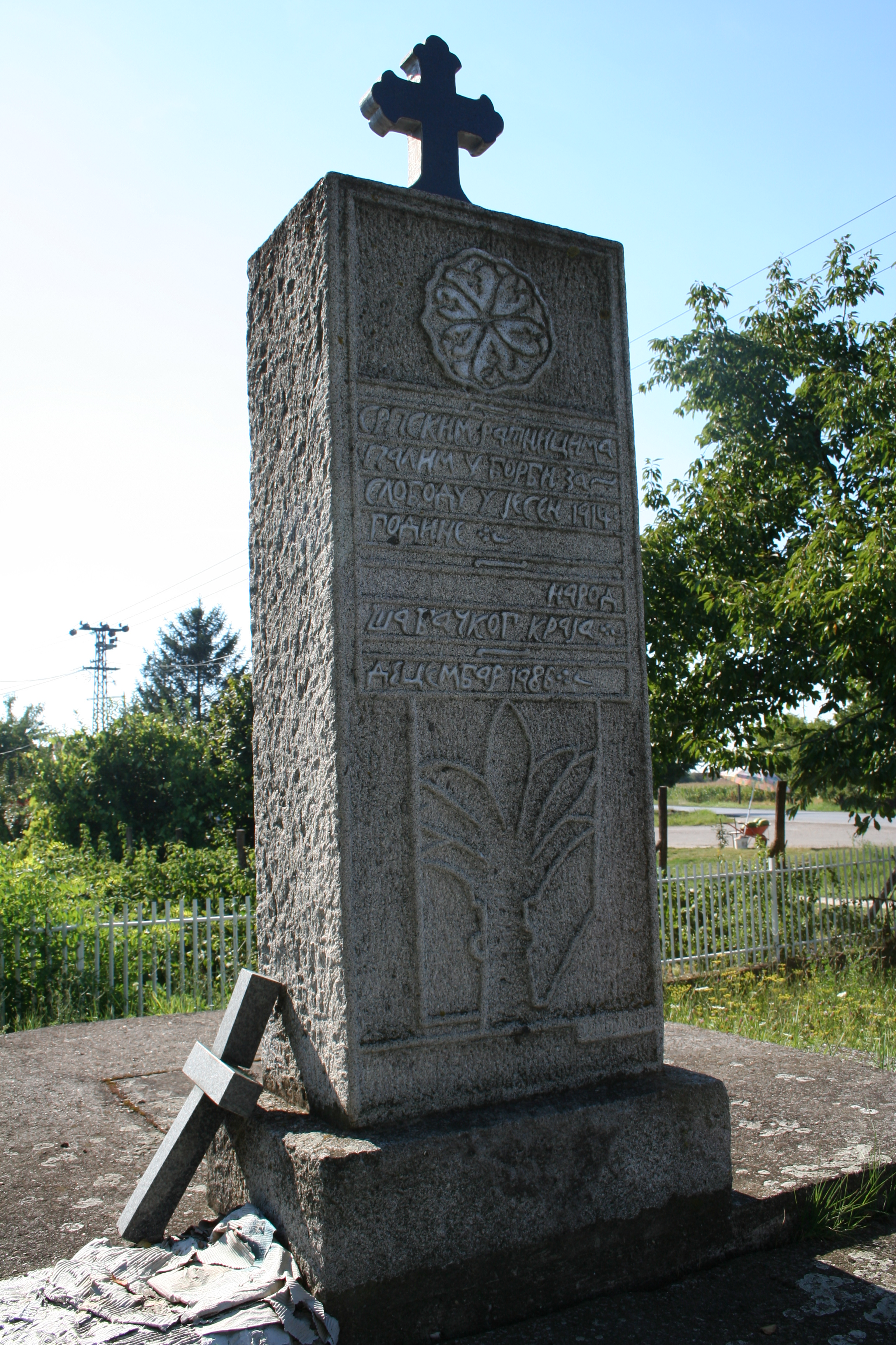 Spomen kosturnica u Majuru, kod Sokine kafane. Prilikom izgradnje zaobilaznice oko Šapca 1984. godine, u kosturnici su izmešteni i pohranjeni zemni ostaci 370 ratnika i ranjenika za vreme Bitke na Ceru 1914. godine.